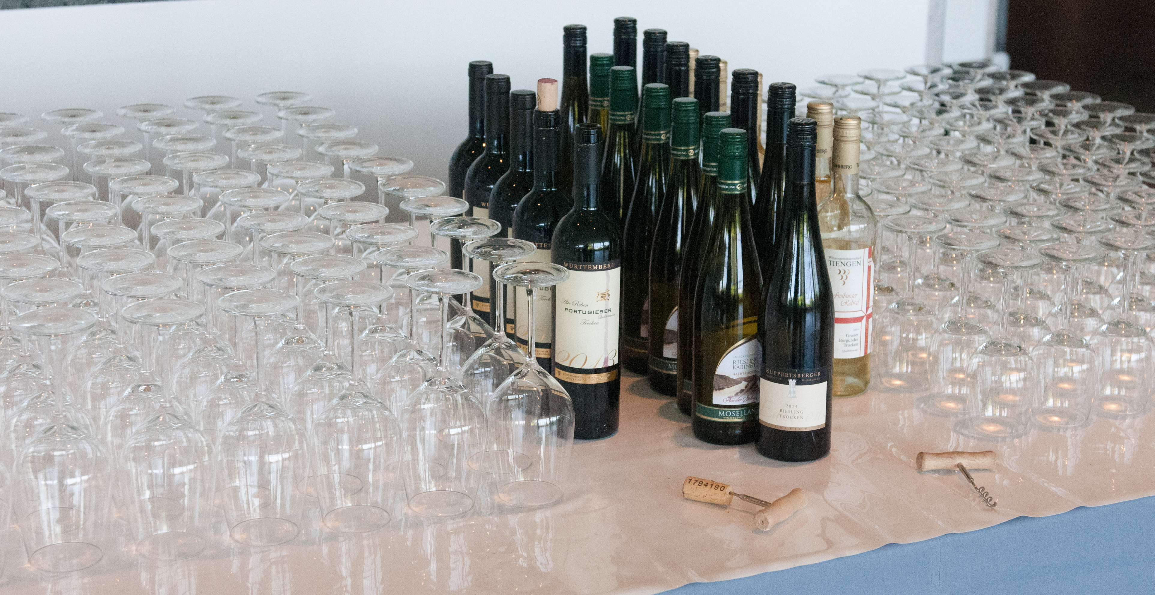 Verkostung von Genossenschaftsweinen auf dem 38th World Congress of Vine and Wine in Mainz - 38. Weltkongress für Rebe und Wein 5.-10. Juli 2015 in Mainz, Rheingoldhalle